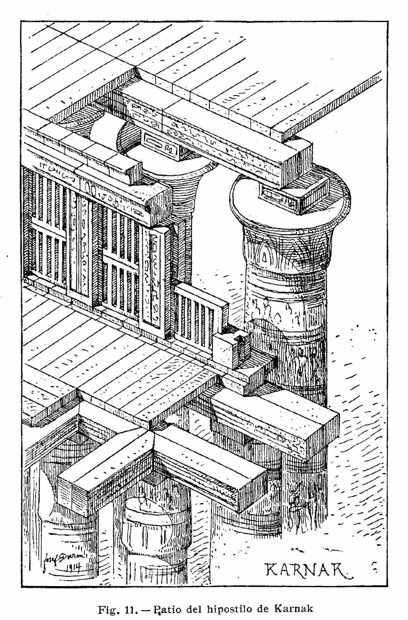 Patio del hipostilo de Karnak (textos del dibujo en español)